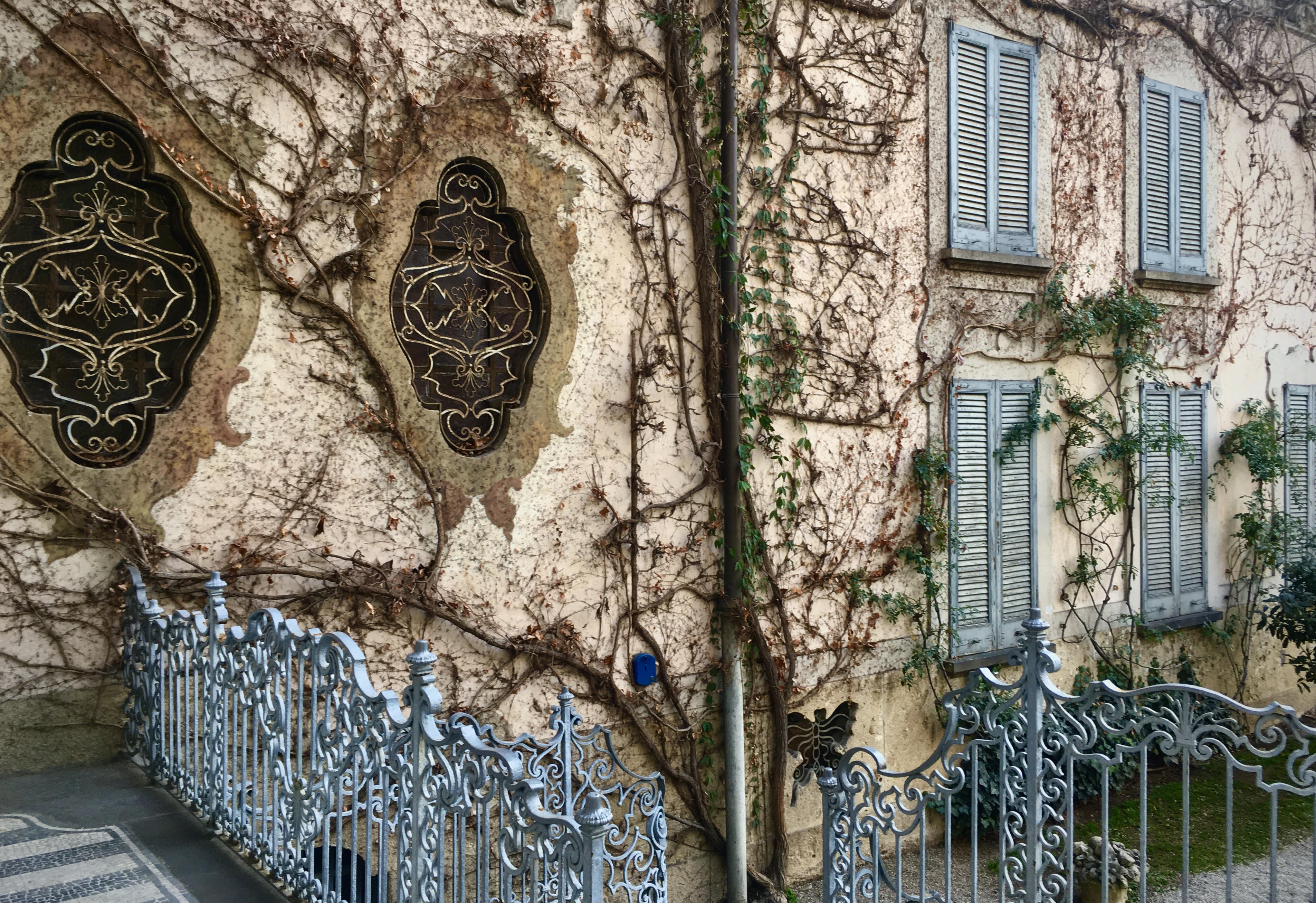 Casa Atellani, affaccio sul giardino